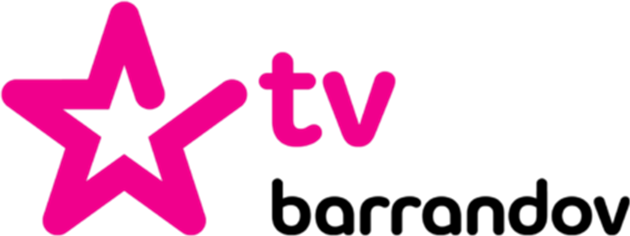 Aktuální logo TV Barrandova